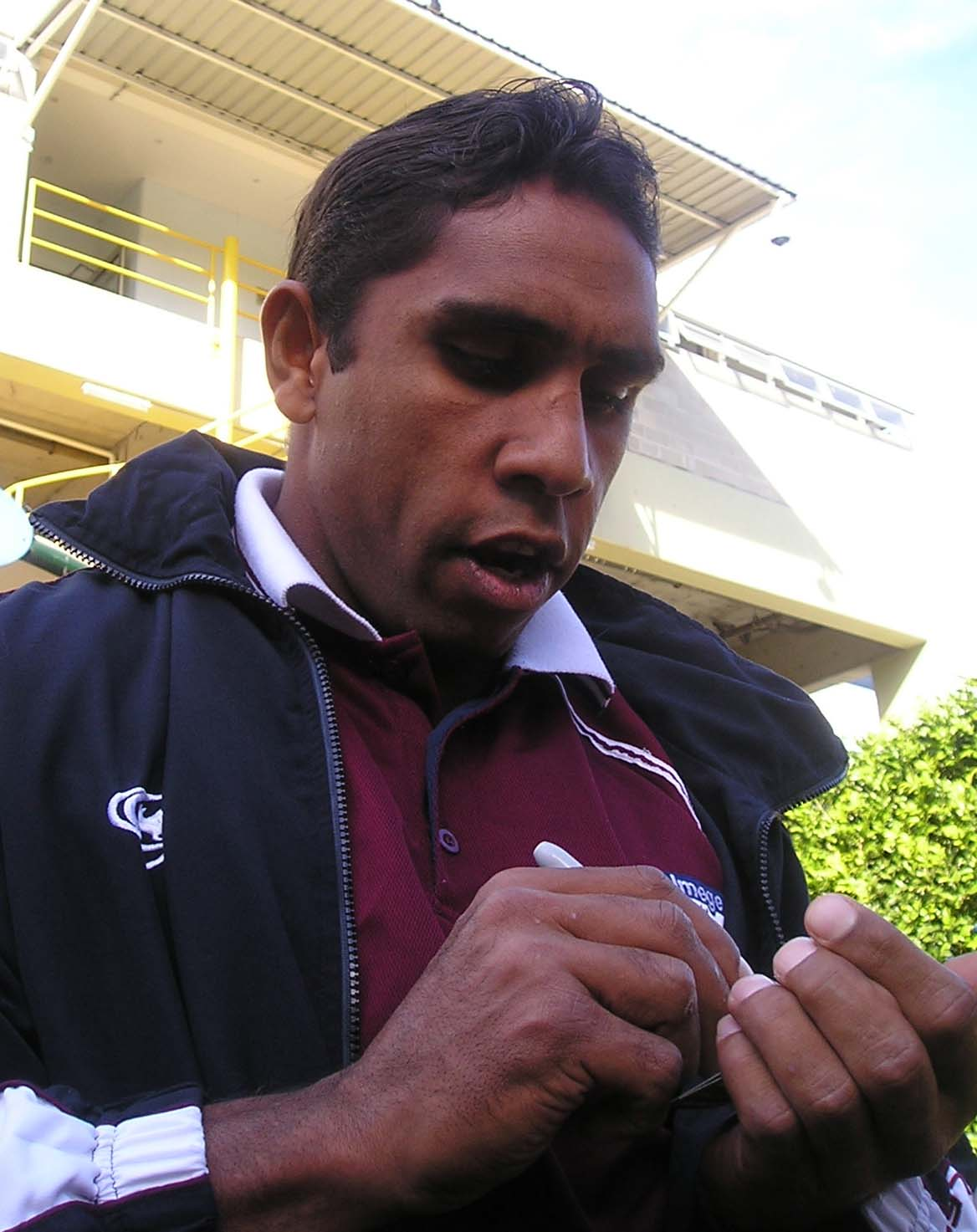 Manly fullback Andrew Walker signs autographs at Parramatta Stadium 2005.